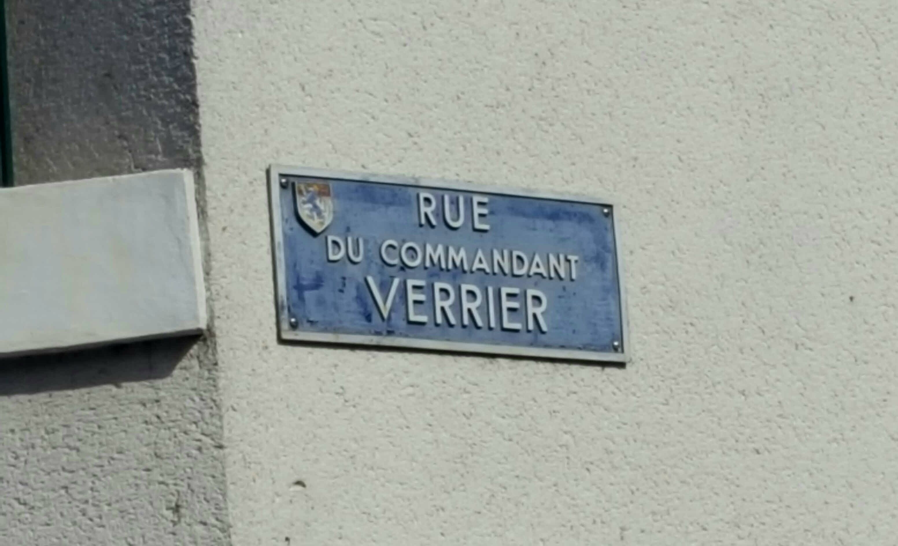 Rue commandant Verrier.